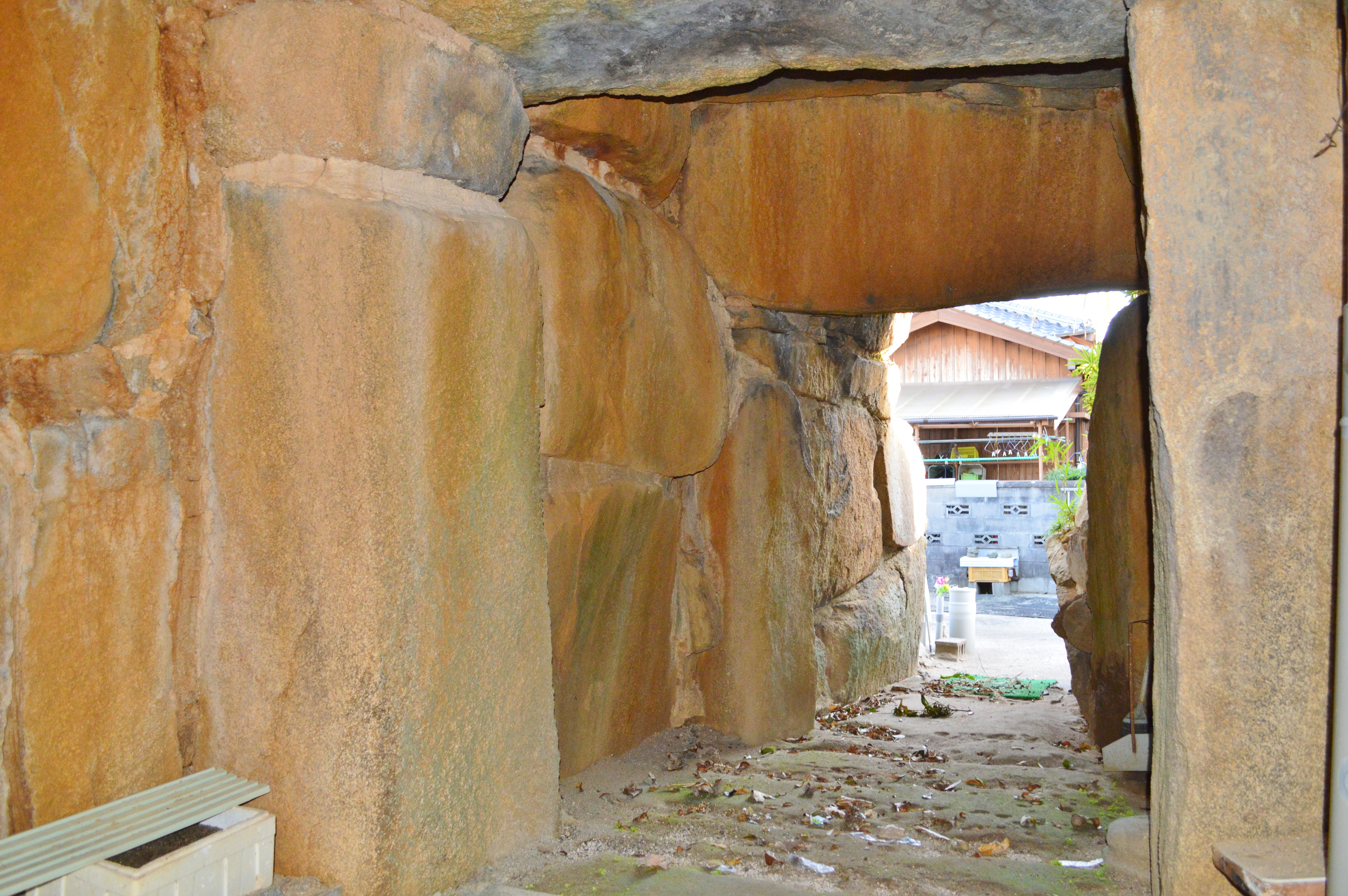 鋳物師大師塚古墳 石室 (玄室から前室・羨道を望む)